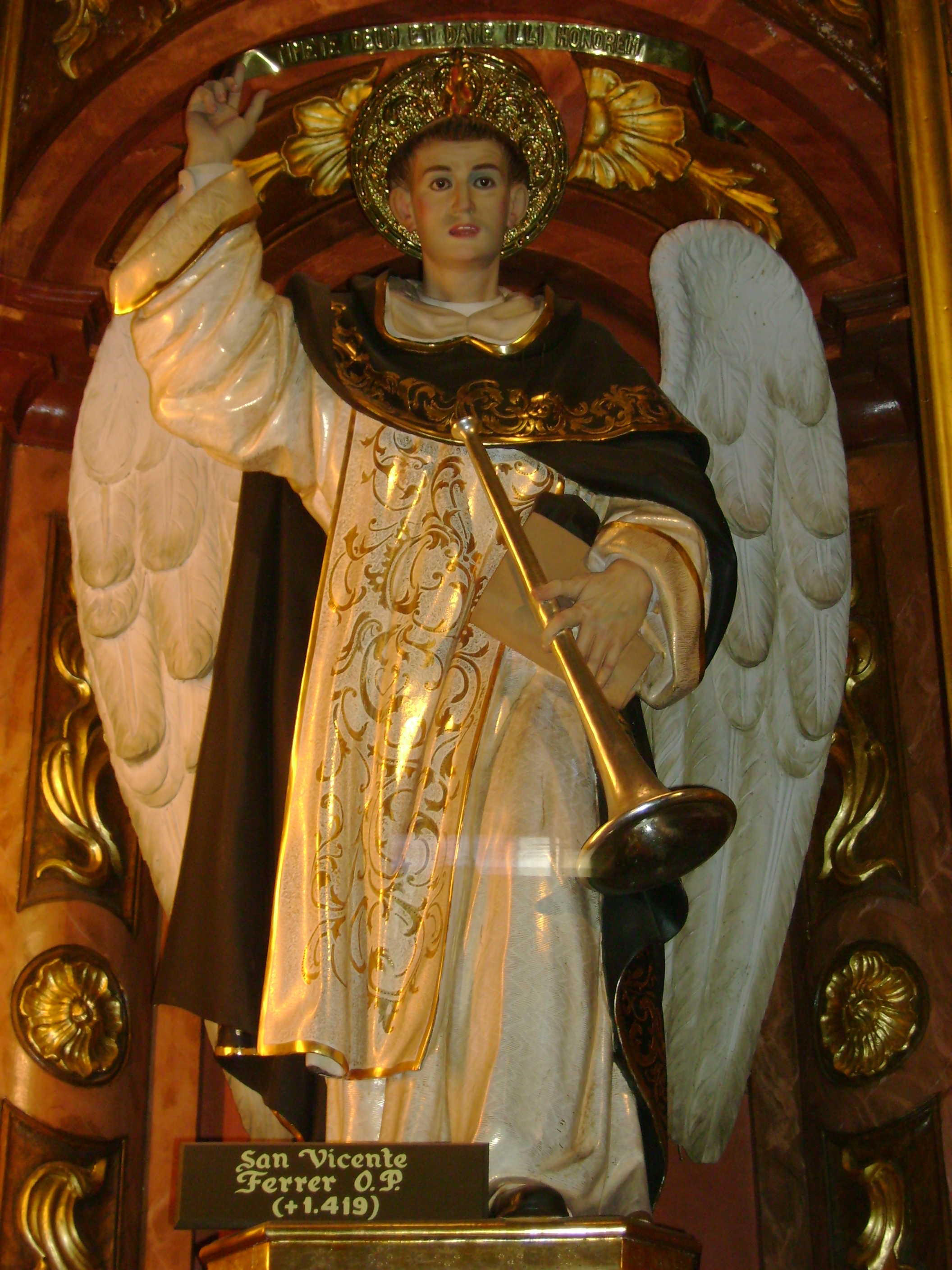 São Vicente Férrer